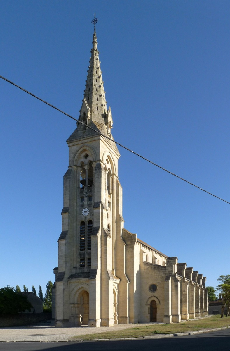 église de Queyrac, Gironde, France